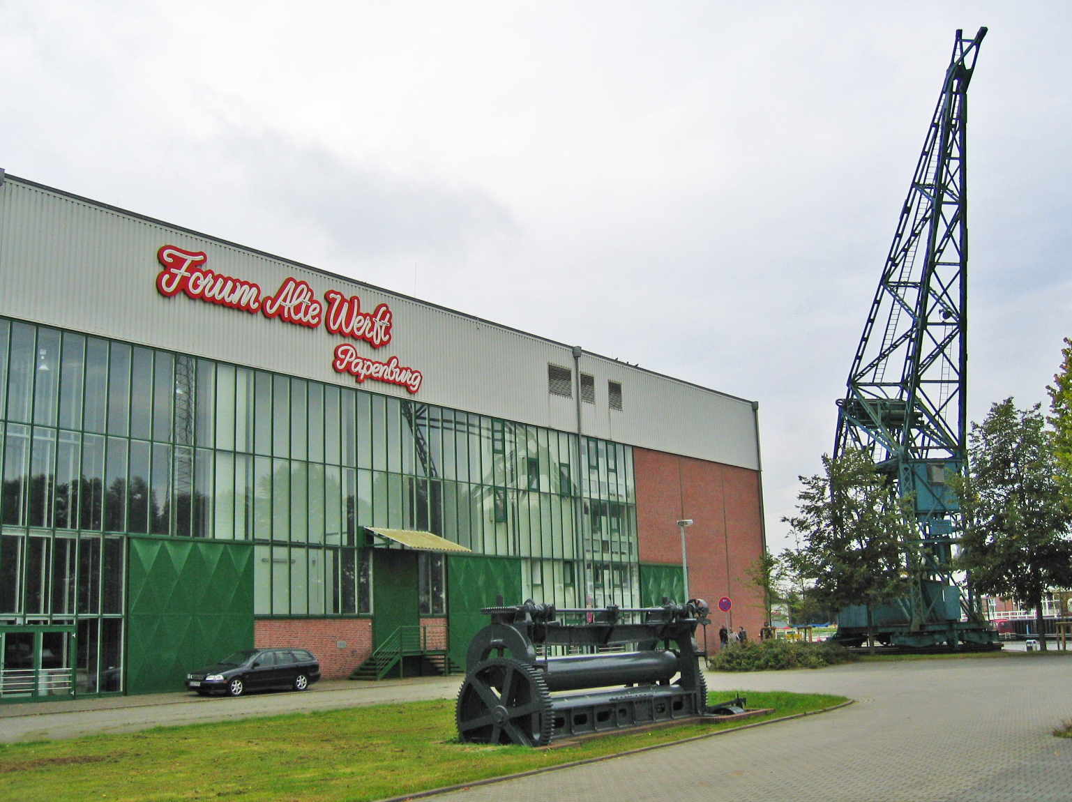 Kultur- und Veranstaltungszentrum Papenburg "Forum Alte Werft" (ehemalige Produktionsstätte der Meyer-Werft) in Papenburg.